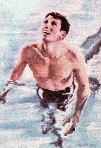 Figurina CAMPIONI dello SPORT 1969/70-n.273- BURTON - USA - NUOTO -Rec